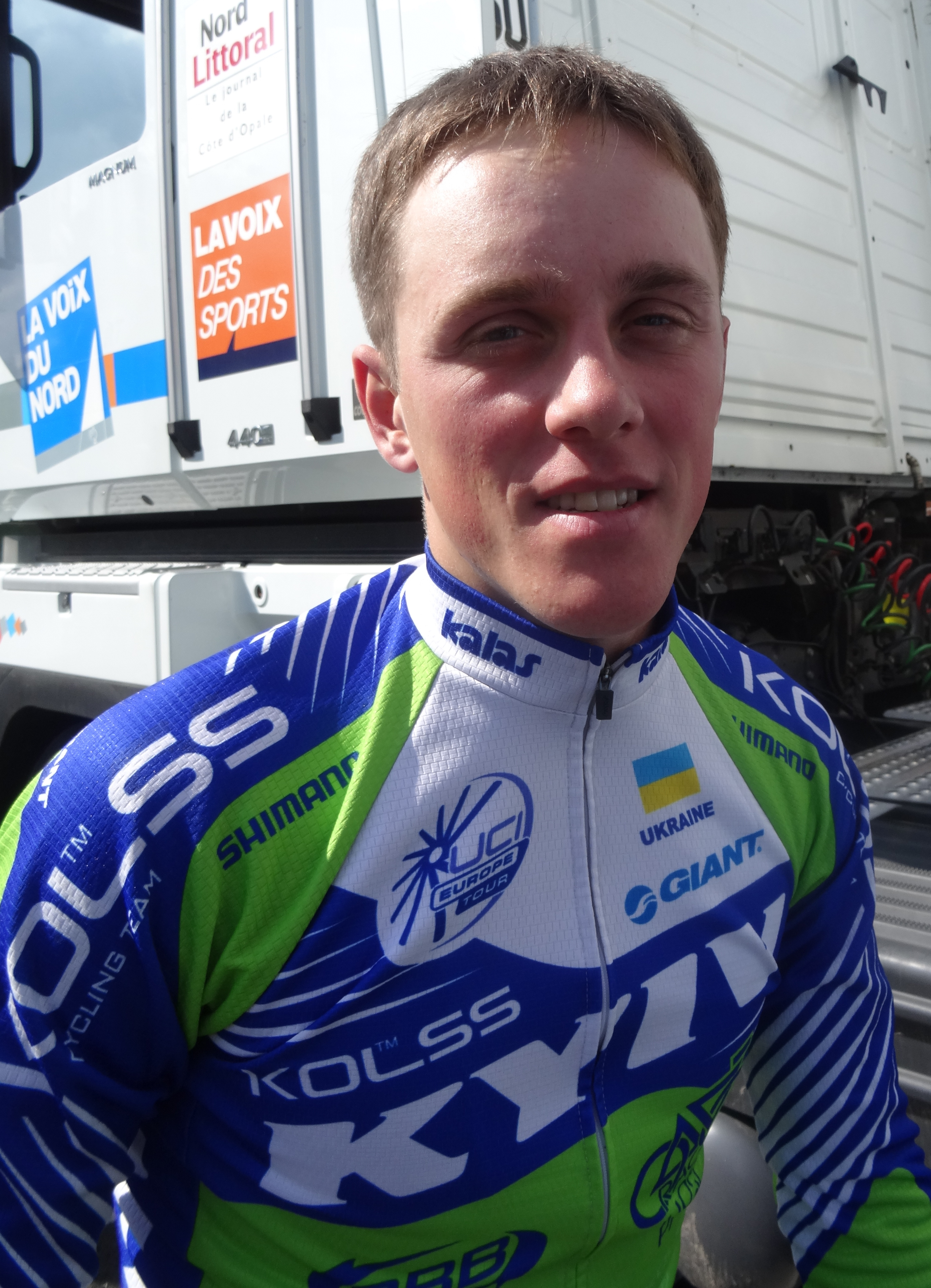 Reportage photographique réalisé le vendredi 23 mai 2014 à l'occasion du départ de la première étape du Paris-Arras Tour 2014 à Lens, Pas-de-Calais, Nord-Pas-de-Calais, France. Depicted person: Andriy Kulyk